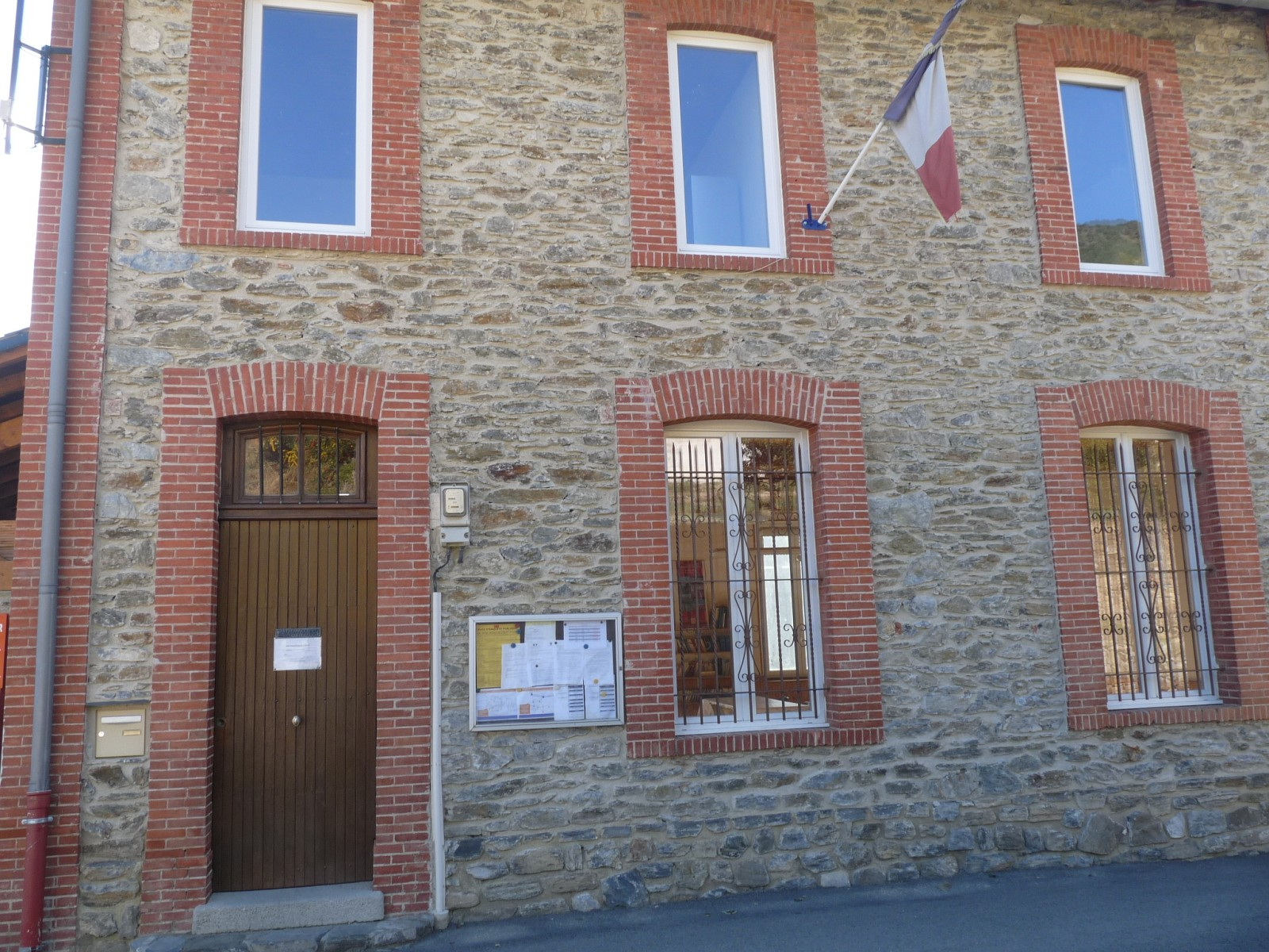 Mairie de Canaveilles , Pyrénées-Orientales, France